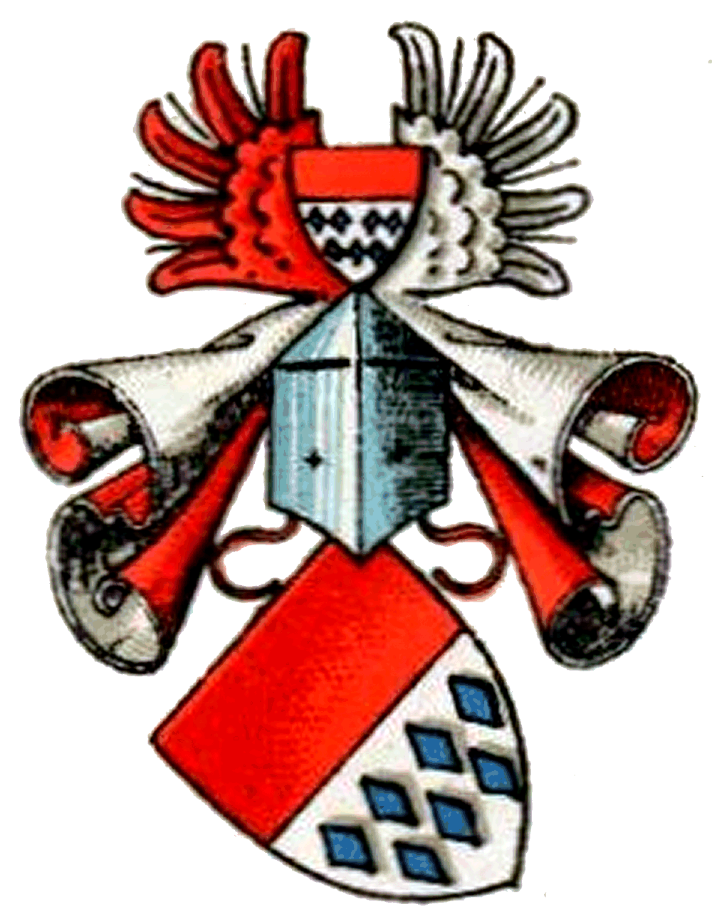 Stammwappen derer von Torck